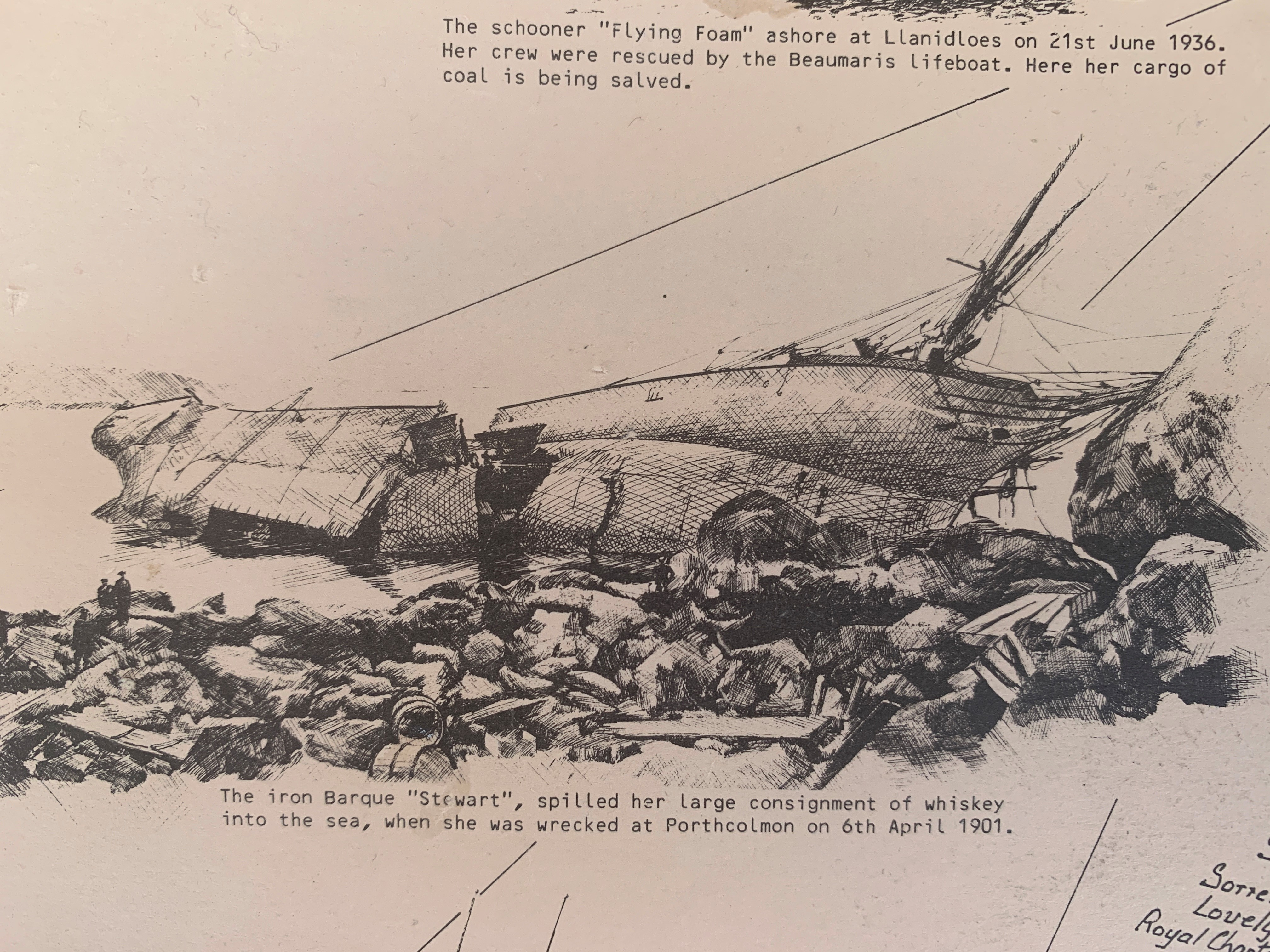 Y Stewart, Porth Ty Mawr, Llangwnnadl.